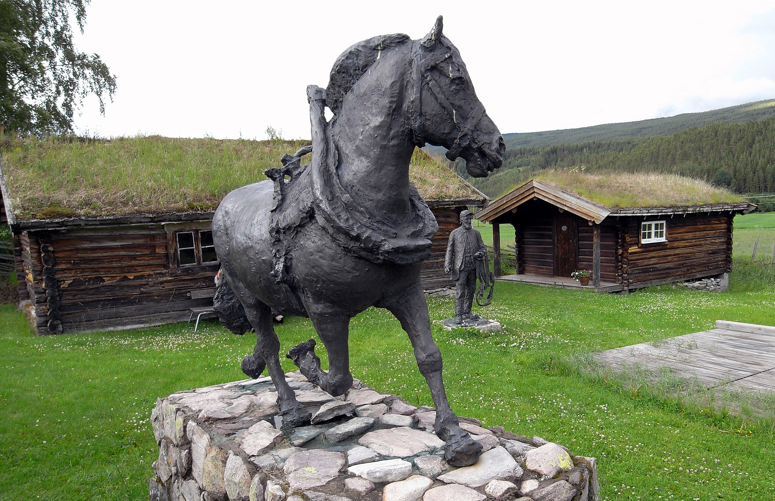 Statue av Vesleblakken fra en fortelling skrevet av Jacob Breda Bull, på Rendalen folkemuseum. Kunstneren er Tore Bjørn Skjølsvik. Foto: Ram Gupta 2010